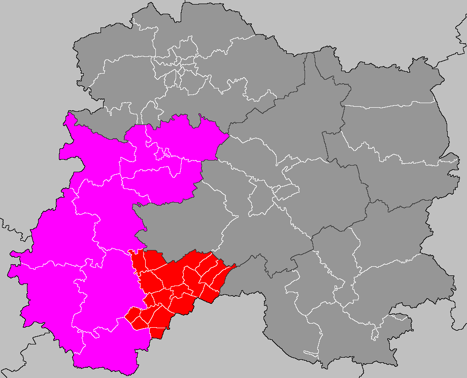 Localisation du canton de Fère-Champenoise